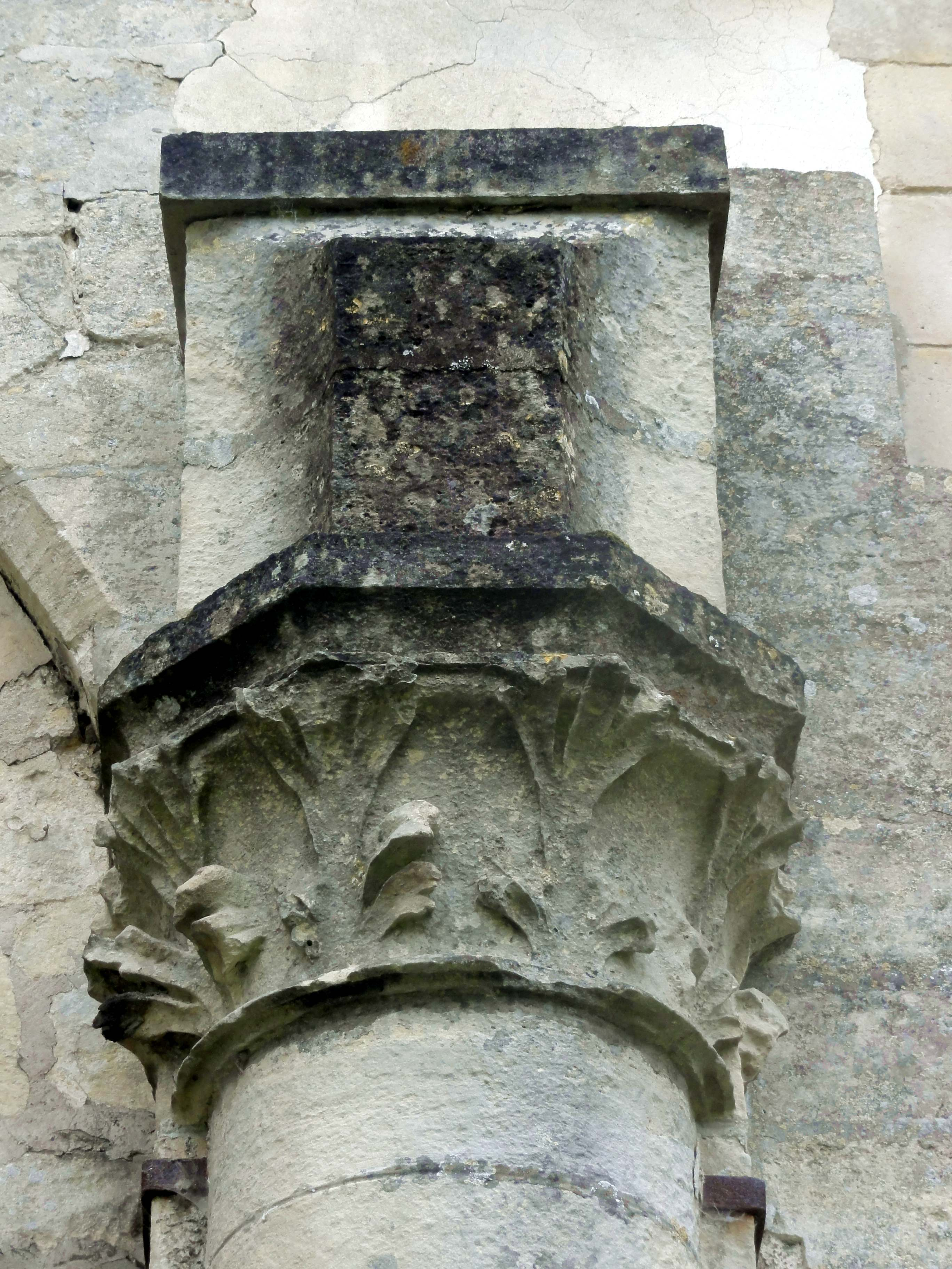 Chapiteaux du XIVe siècle sur l'avant-dernier contrefort du bas-côté nord, à l'extérieur.